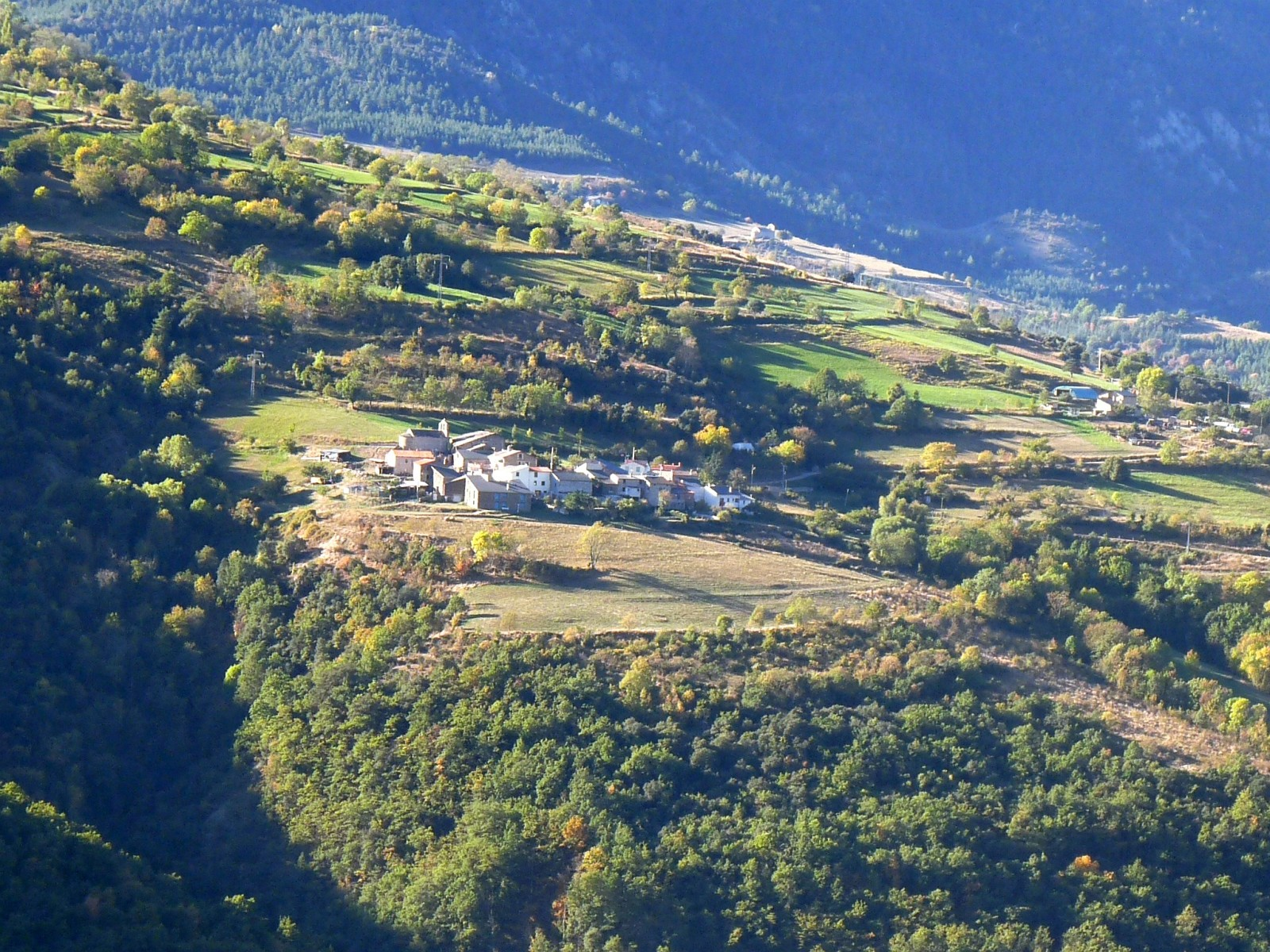 Souanyas vu de Jujols, Pyrénées-Orientales, France